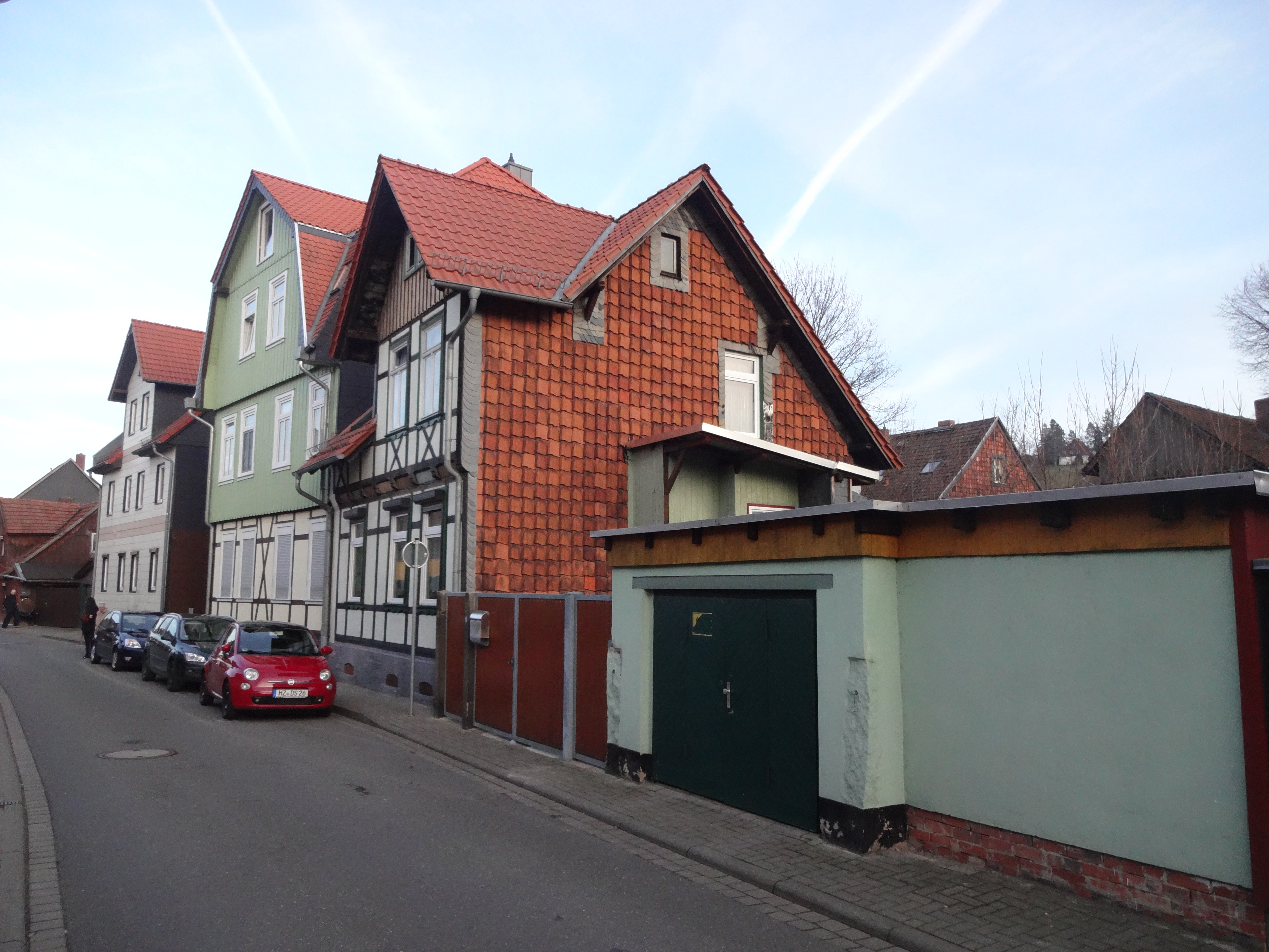 Teil der ehemals denkmalgeschützten Häusergruppe Lüttgenfeldstraße 10a, 10b, 10c, 11, 12 in Wernigerode